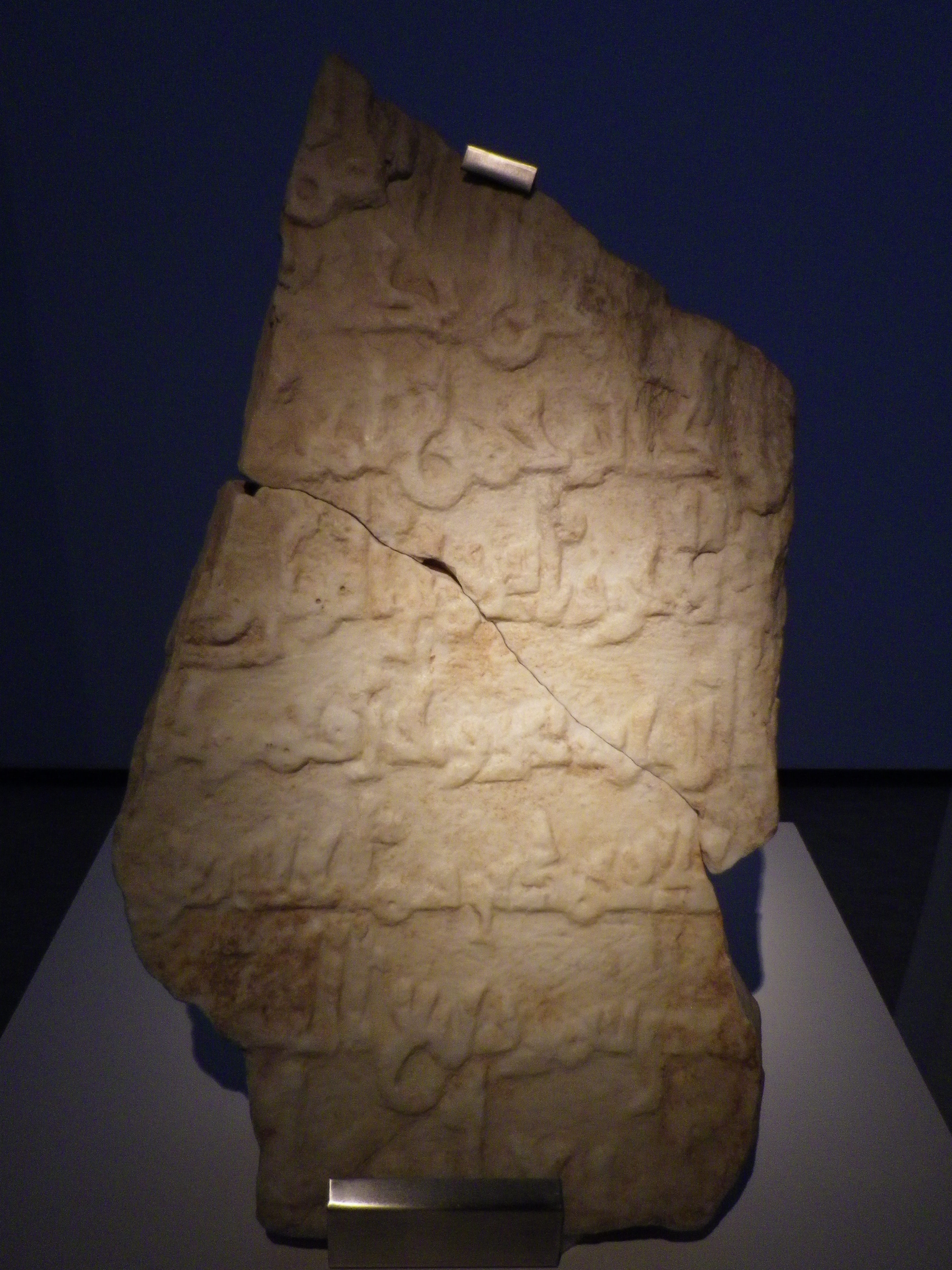 Fotografía de la posible piedra fundacional de la ciudad de Almería, Andalucía, España, donde se citan a Abd al-Rahman III, califa, y a Muhammad ibn Rumahis, almirante de la flota y gobernador de la cora de Pechina (Almería). Se conserva en el Museo Arqueológico de Almería.